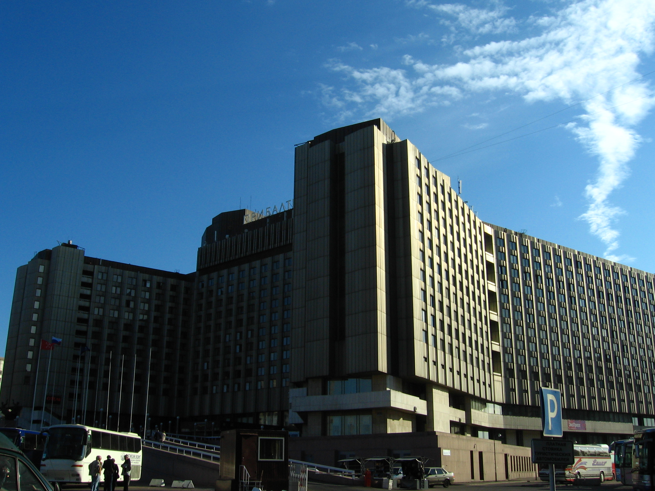 Pribaltiyskaya hotel in Saint Petersubrg